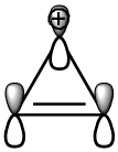 Figura 2. Orbitais 2p do cátion ciclopropenílico. Sistema aromático de Huckel (4n+2) elétrons π.